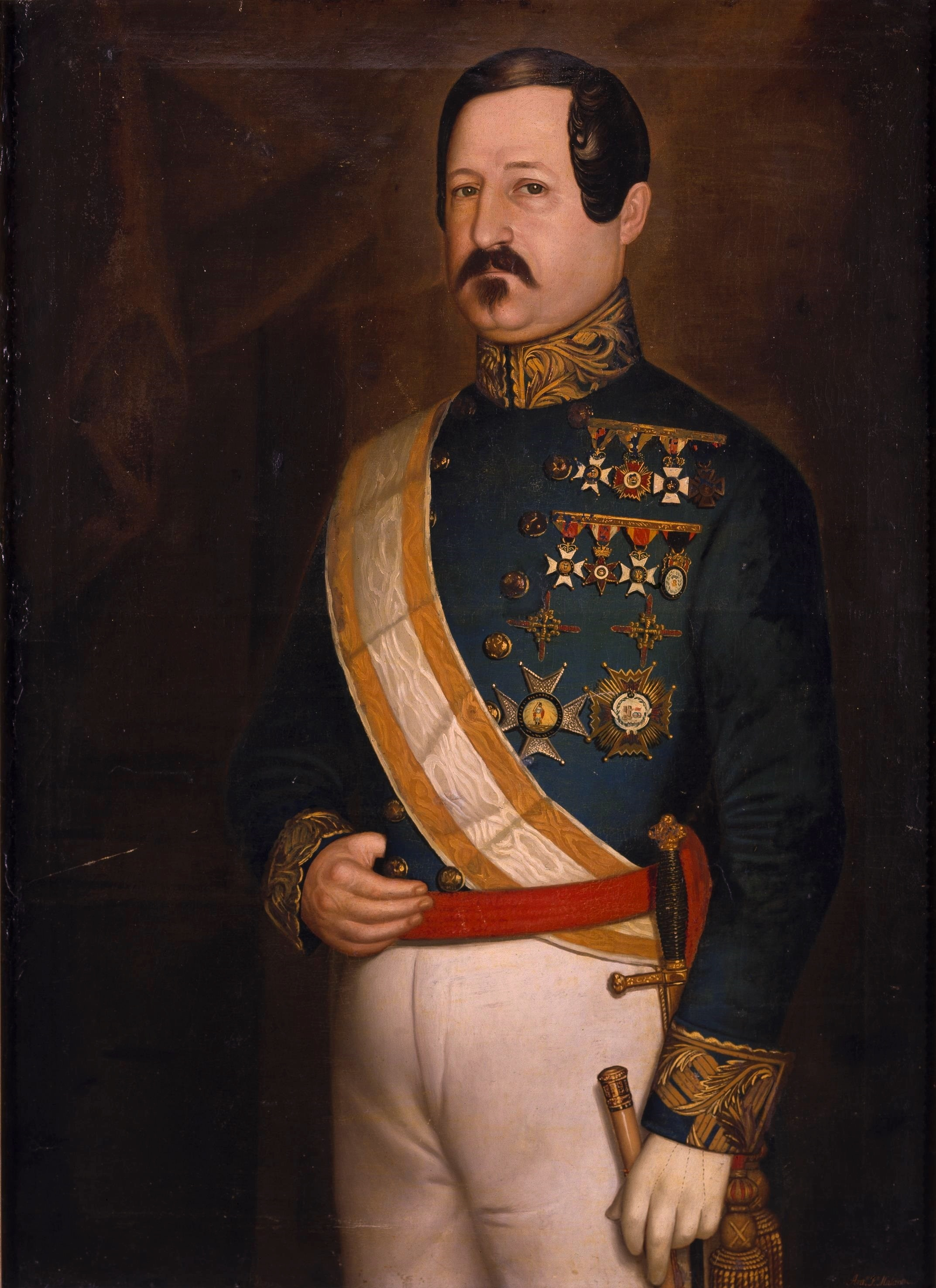 Retrato del militar español Ramón Montero y Blandino (1798-?), que llegó a ser gobernador general de Filipinas en diversos periodos y nació en San Fernando en 1798. Sobre el uniforme ostenta la gran cruz y la banda de la Orden de Isabel la Católica y la gran cruz y dos cruces sencillas de la Orden de San Fernando.